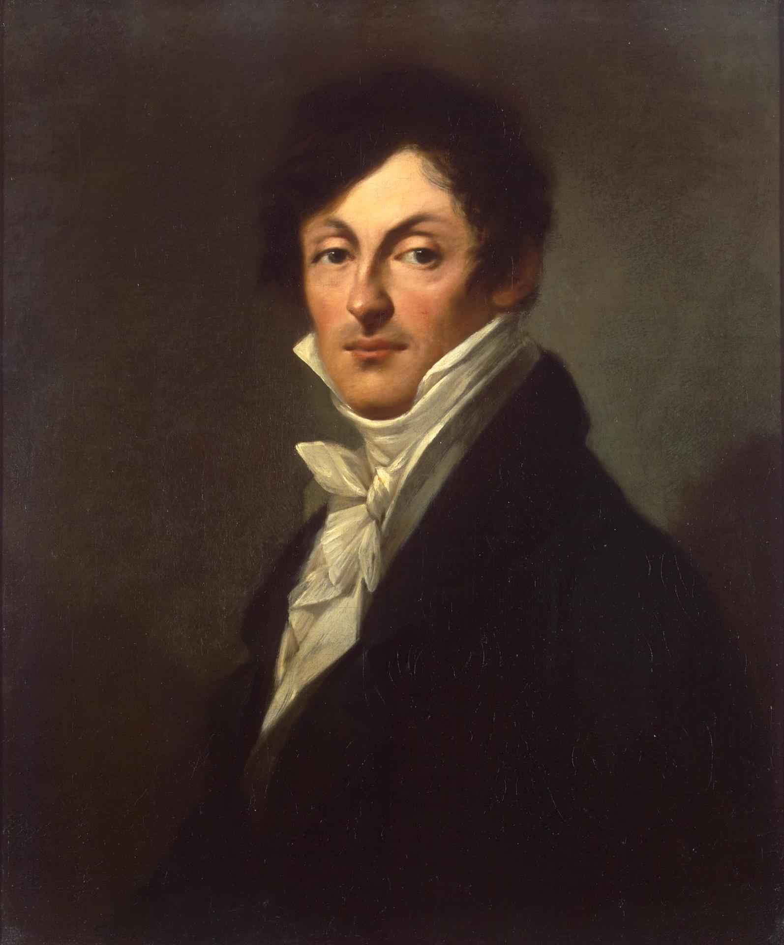 Russian general A.I. Osterman-Tolstoi